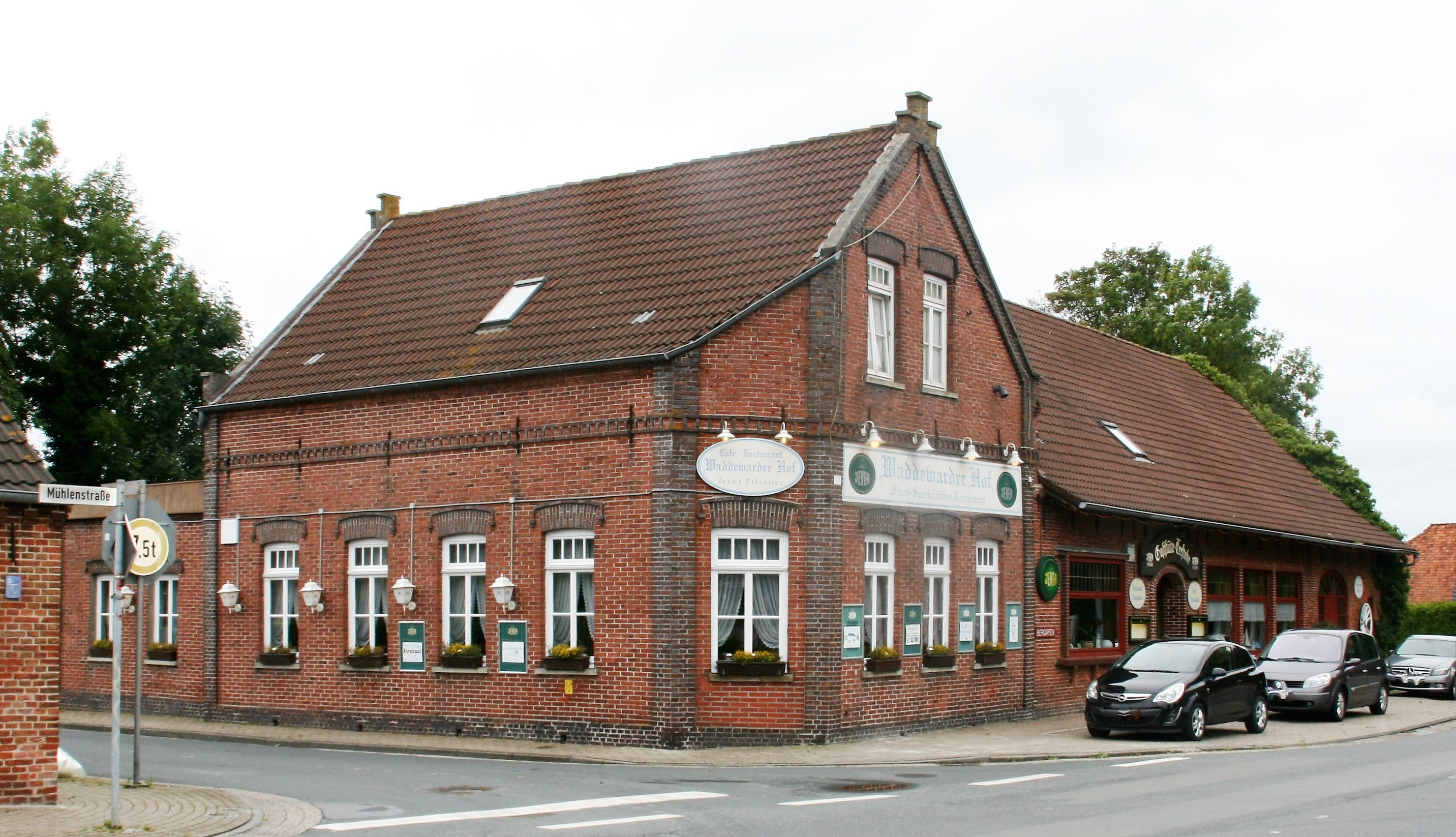 Waddewarder Hof, errichtet 1850 gegenüber der Ev, Kirche in Waddewarden.